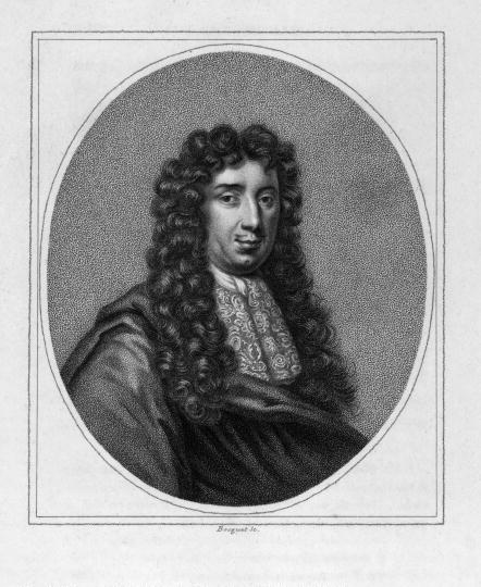 Der englische Politiker George Savile, 1. Marquess of Halifax (1633-1695)